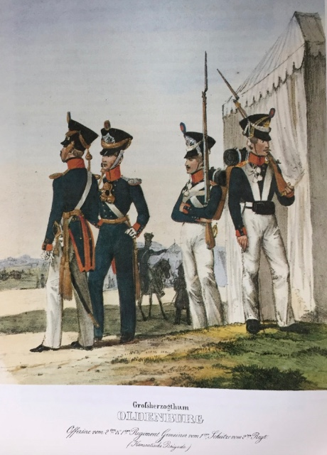 Altkolorierte Lithographie aus Heinrich Ambros Eckert und Dietrich Monten: Das deutsche Bundesheer in charakteristischen Gruppen 1838